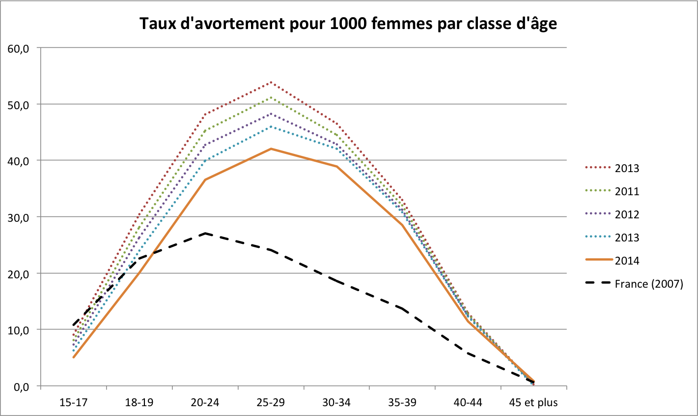 Taux d'avortement par classe d'âge en en Russie sur la période 2010 2014 - Comparatif avec la situation française (2007) Source Rosstat - Drees pour la France